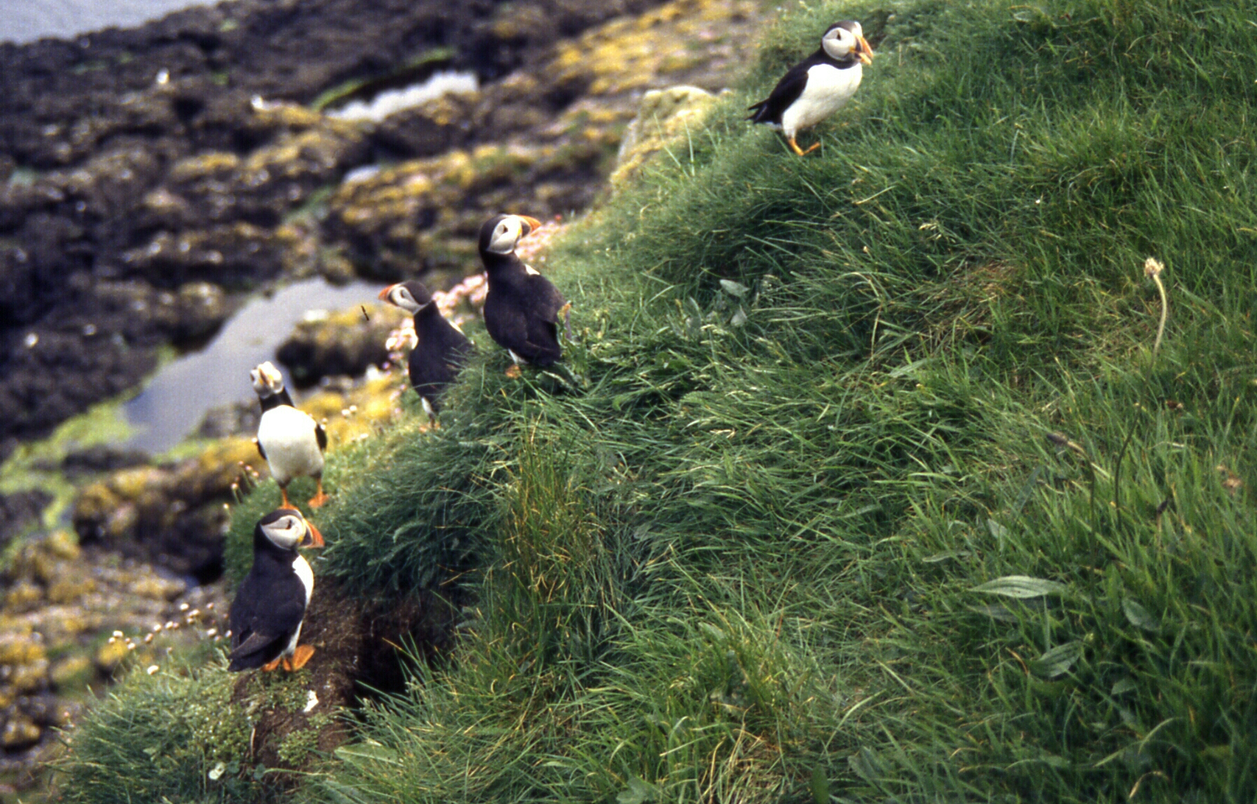 Puffins auf Insel Staff